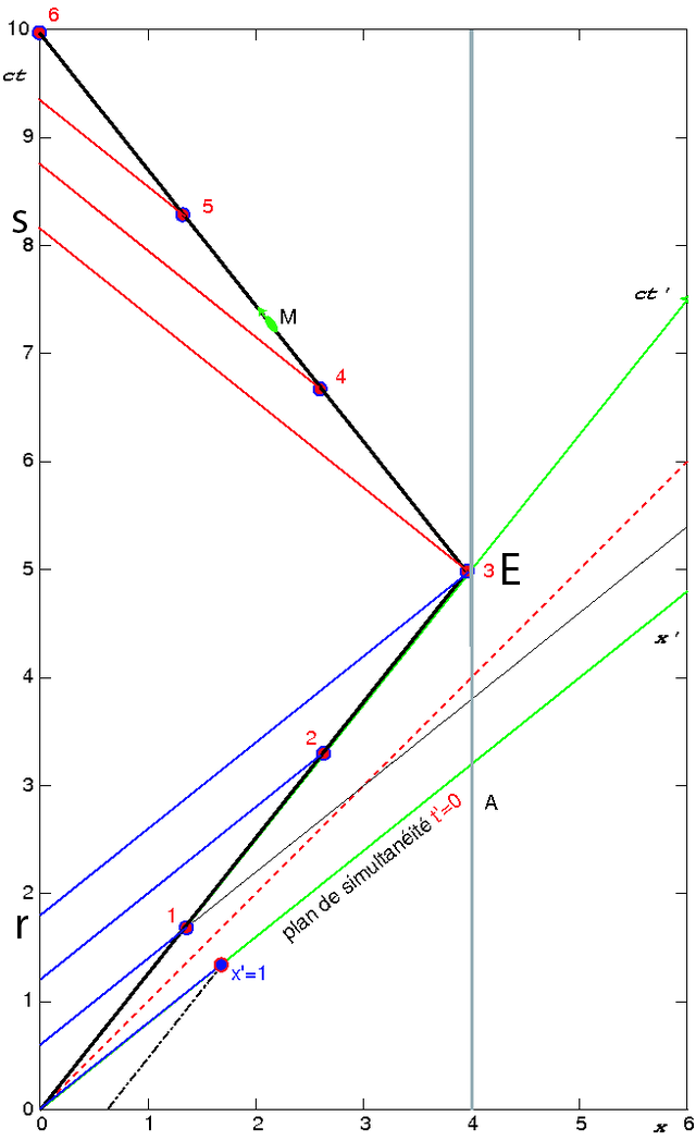 hyperplans d'instantanéité du jumeau de Langevin effectuant un aller-retour à vitesse V=0,8c sur une distance L=4 unités du référentiel du jumeau fixe. En bleu, les hyperplans de la phase aller, en rouge ceux de la phase retour. La ligne d'univers de la coordonnée x'=1 a été de plus tracée pour mémoire afin de rappeler le phénomène de contraction des longueurs (mesure de L'=1, à t=0 dans (R).